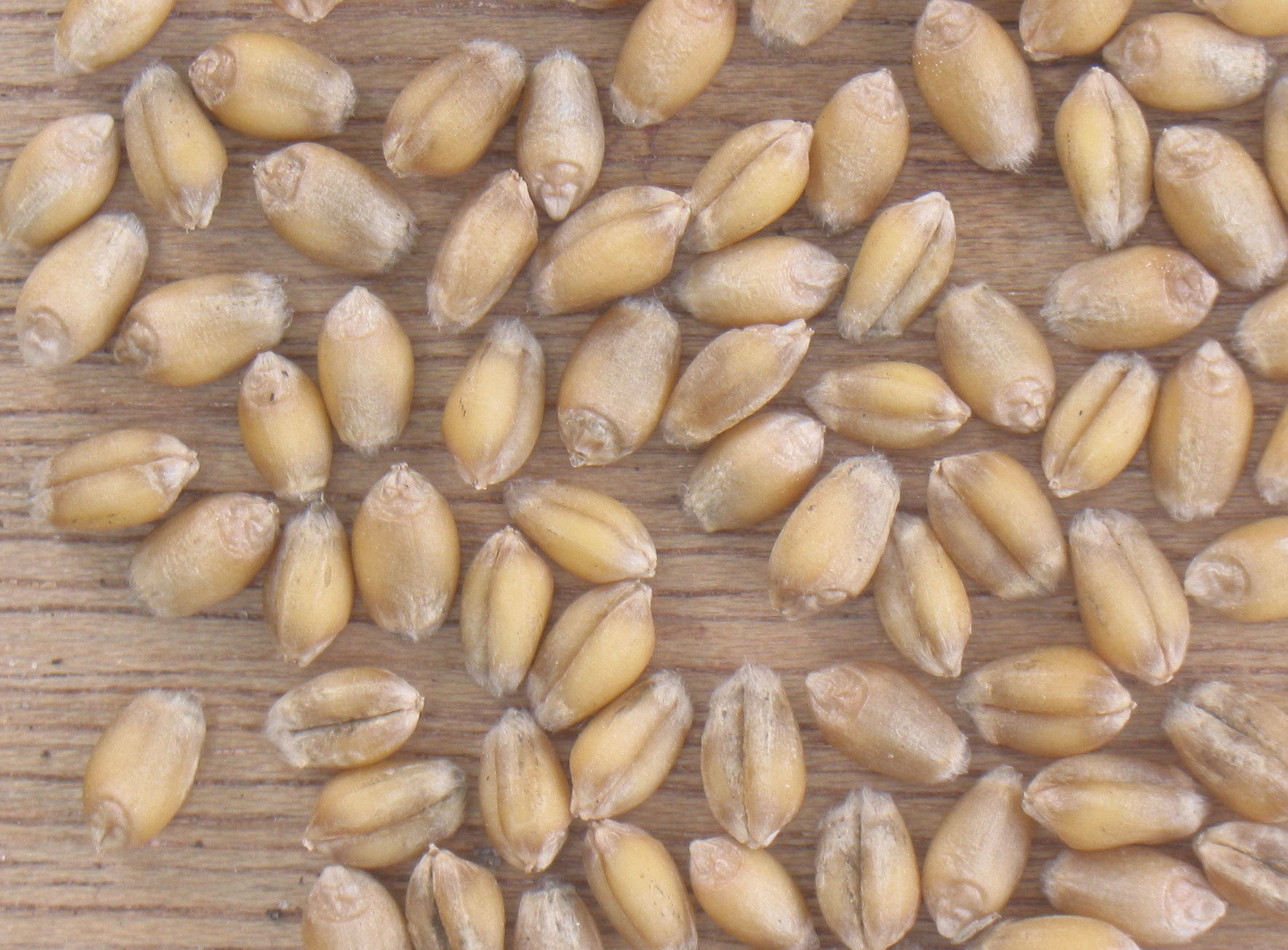 (Tarwe korrels) Triticum aestivum